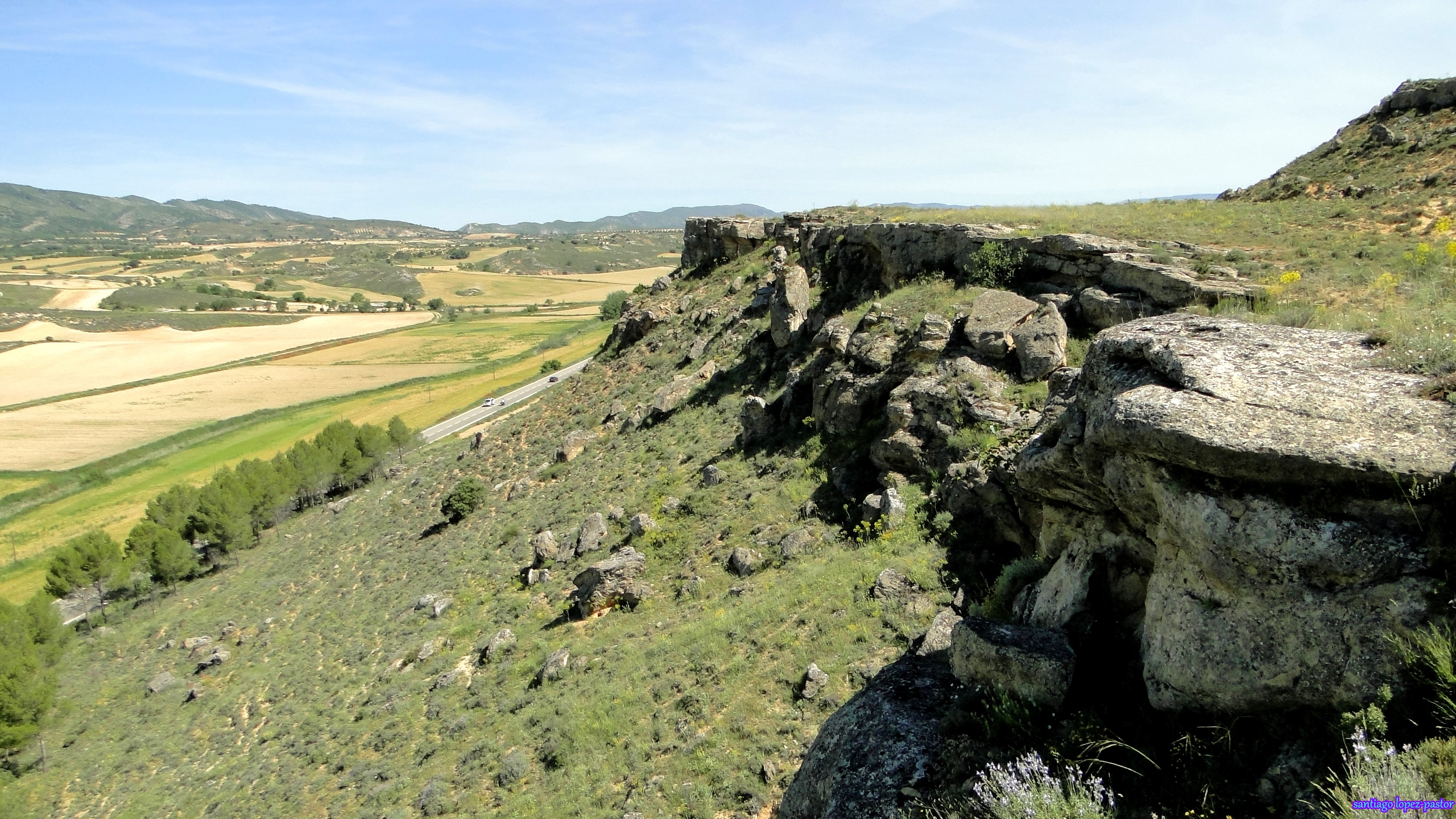 El yacimiento arqueológico de "La Cava" se encuentra en la Alcarria conquense, en la Sierra de Altomira muy próximo a la frontera con la provincia de Guadalajara, cerca del pueblo de Garcinarro. Es un yacimiento con elementos de distintas épocas. Por ejemplo una piedra retallada para asemejarse a una serpiente, posiblemente de época íbera. Un poco y una cantera de epoca romana. Eremitorios y una necrópolis de época visigoda. Lo más relevante son tres estancias talladas en la roca identificadas con un santuario religioso íbero del año 450-400 a.C., y una enorme estancia con muros de más de 4 metros de altura igualmente tallados en la roca y de dudosa funcionalidad.